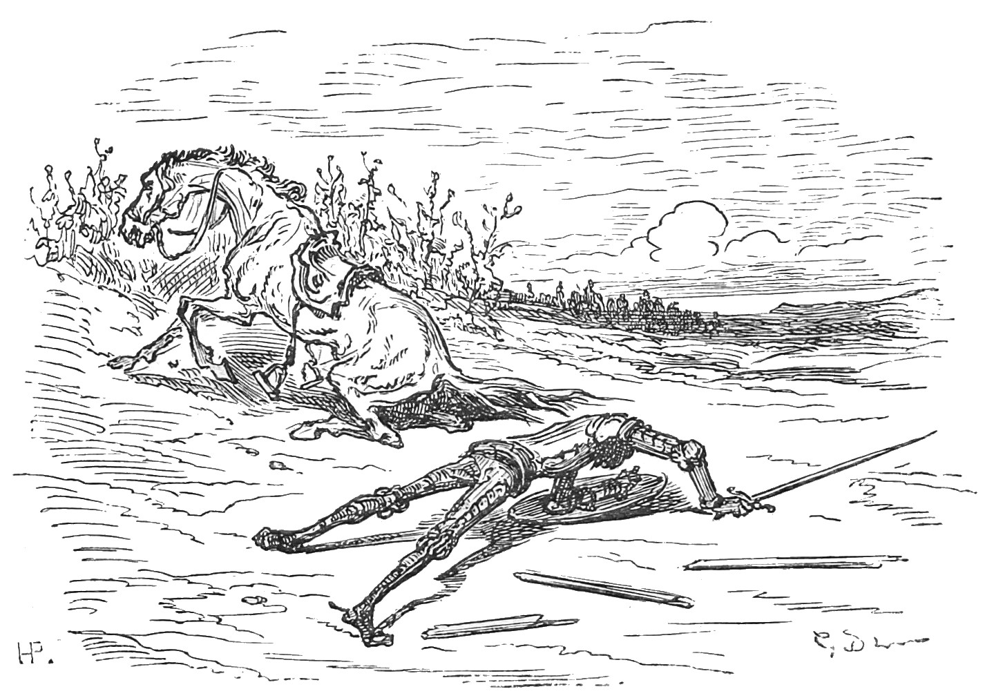 "Dom Quixote desfalecido" iIustração por Gustave Doré para “Don Quixote“ de Miguel de Cervantes.